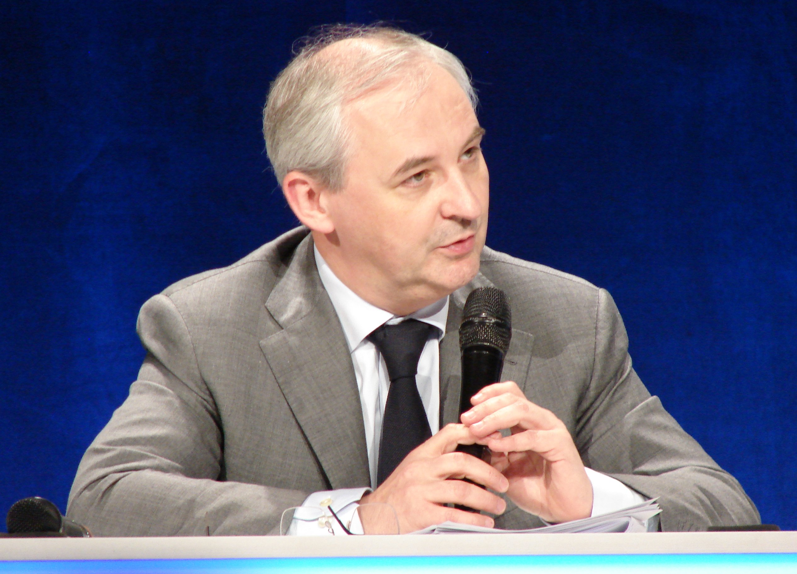 Francois Perol de la BPCE à Planète PME